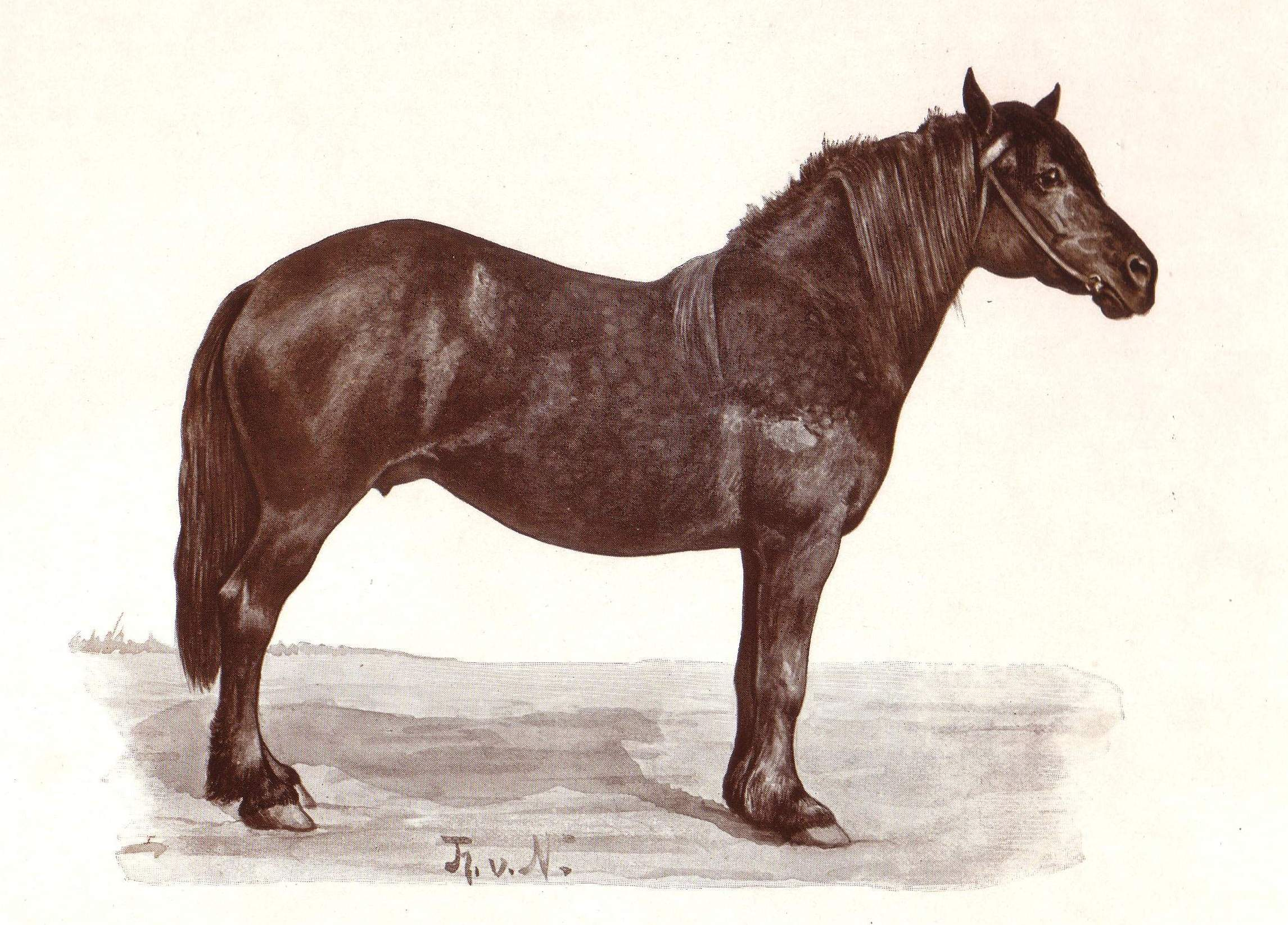 Norier. Braune Stute, geb. in Oesterreich